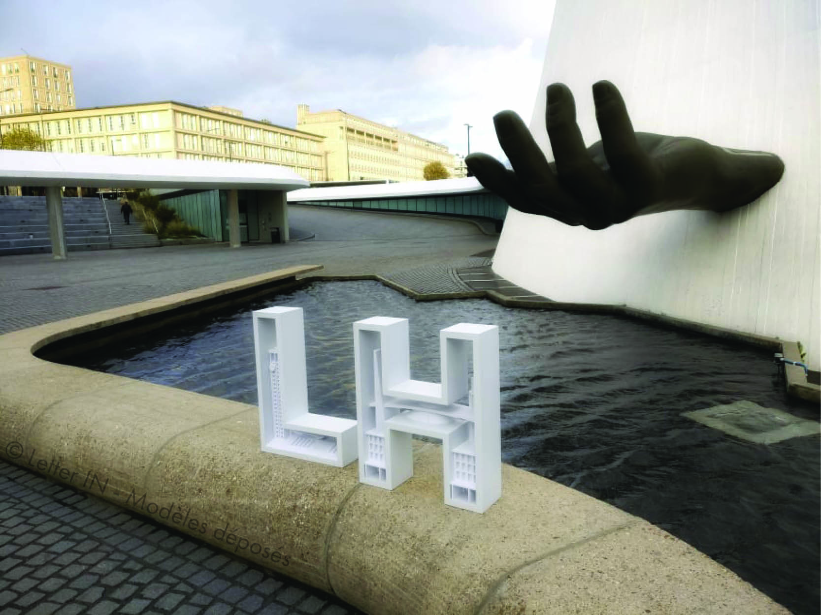 Art lettres en impression 3D par Letter IN au Havre.